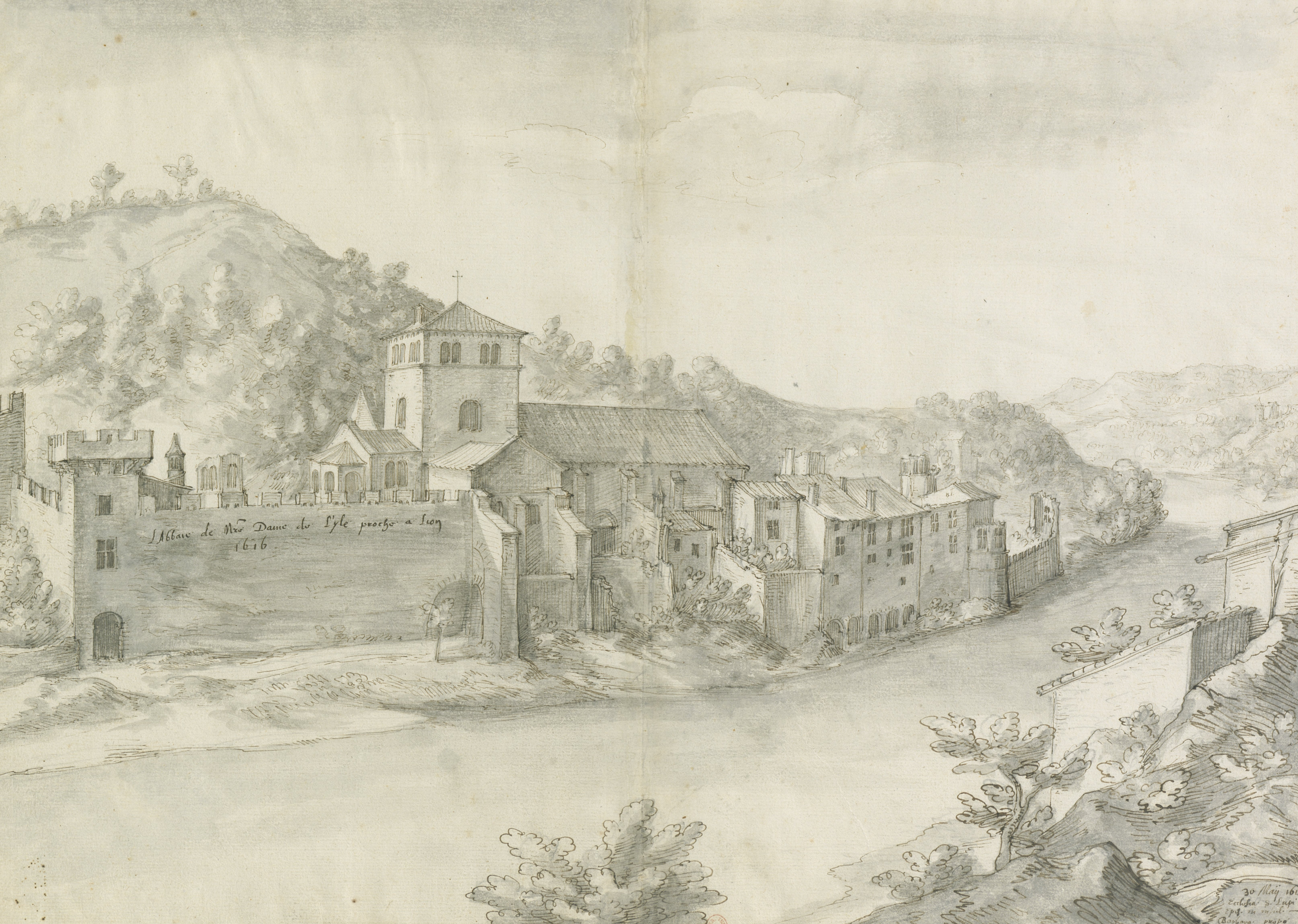 L'Abbai de Notre Dame de l'île proche à Lyon, 1616.